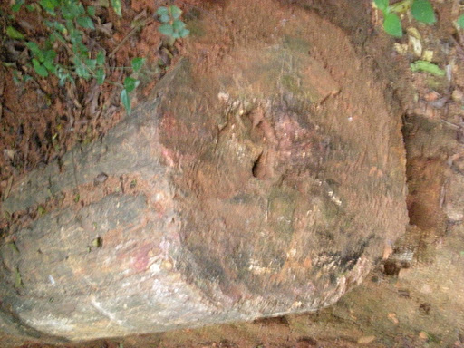 விழுப்புரம் மாவட்டத்தில் திருவக்கரையில் காணப்படும் பலகோடி ஆண்டுகளுக்கு முன்னதான கல்மர அதிசயம்.